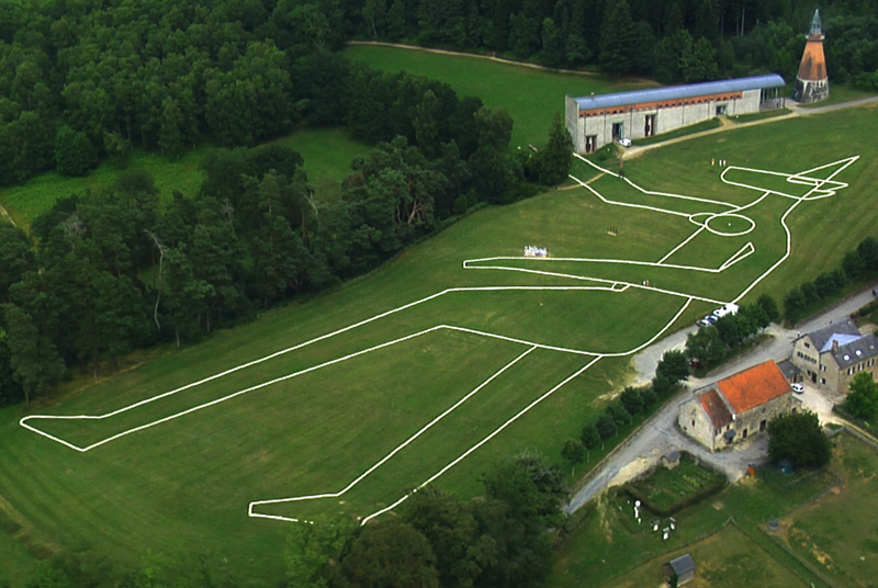 Balkis Island, Yona Friedman licorne vassiviere